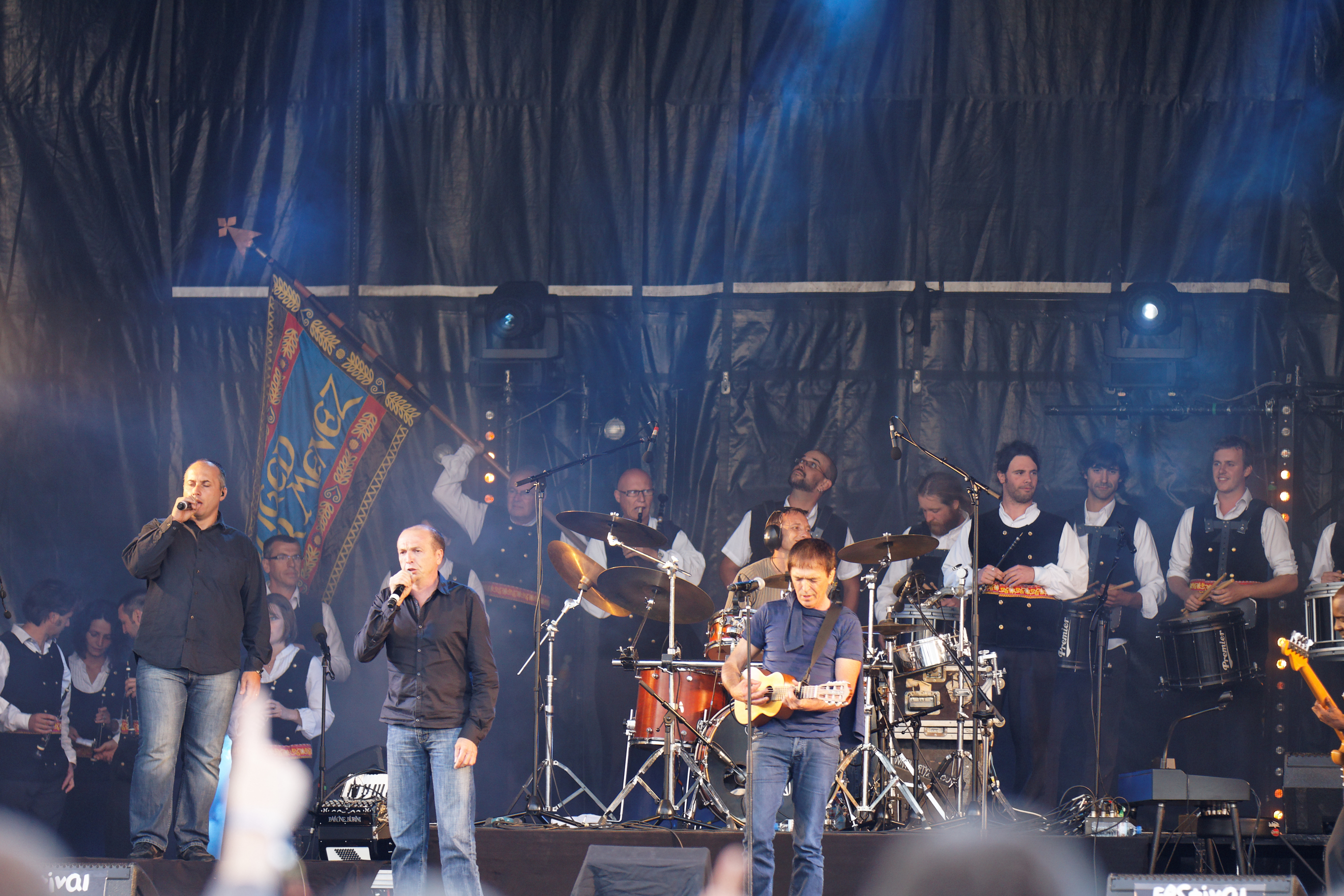 I Muvrini, accompagné du Bagad de Plomodiern, en concert sur la scène Landaoudec lors du festival du bout du Monde à Crozon dans le Finistère (France).